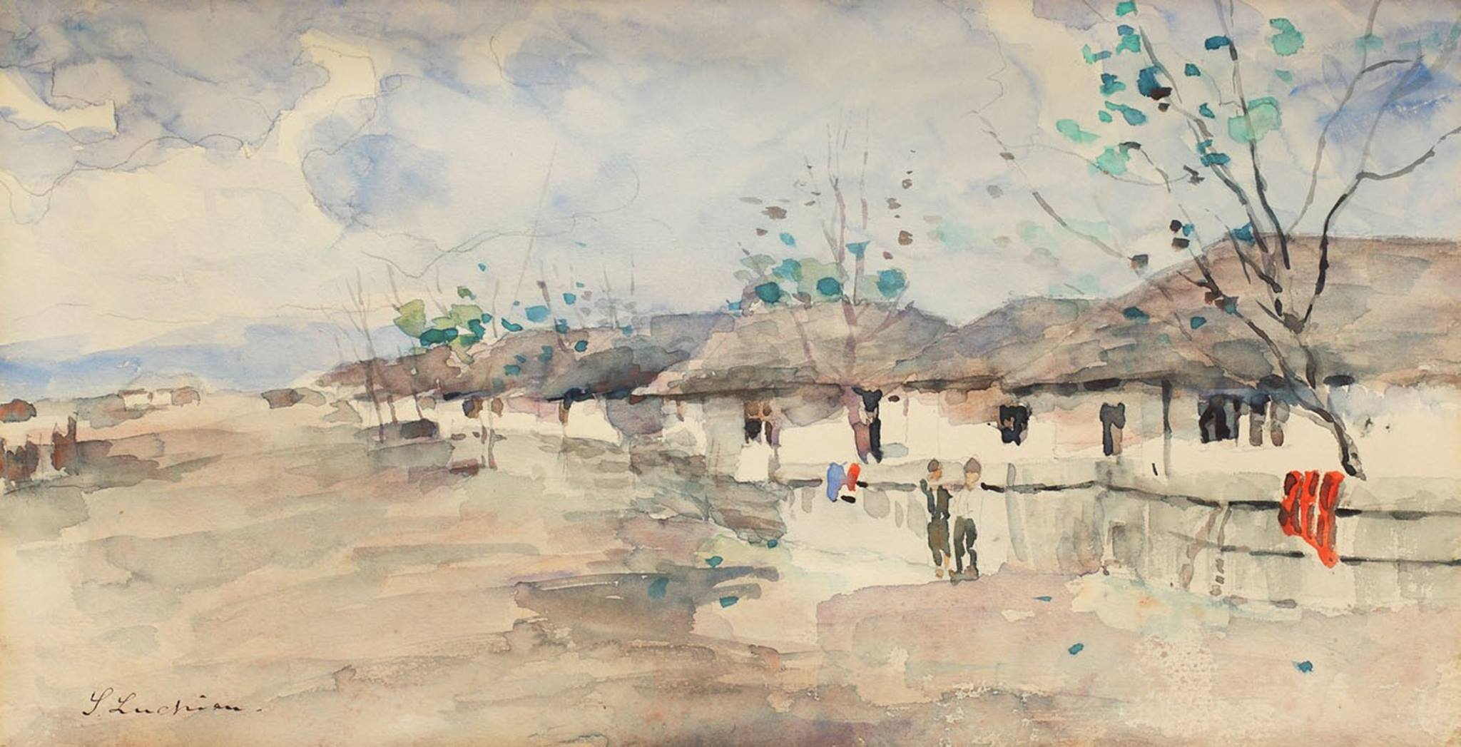 După ploaie la Băneasa, acuarelă şi creion pe carton subţire, 20 × 36,5 cm, semnat stânga jos, în peniţă, Ş. Luchian